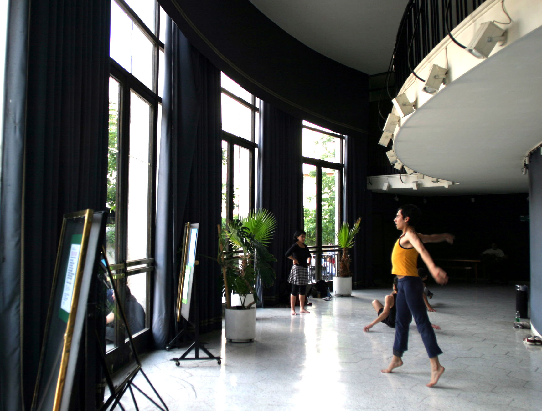 FACHADA INTERIOR DE LA FACULTAD DE ARTES 27-OCTUBRE-2003